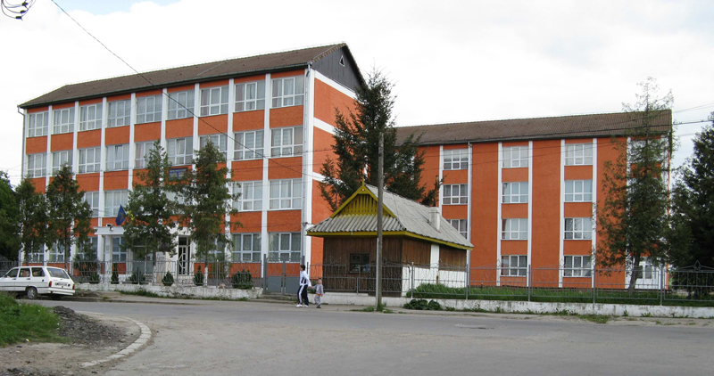 Colegiul National Avram Iancu Stei